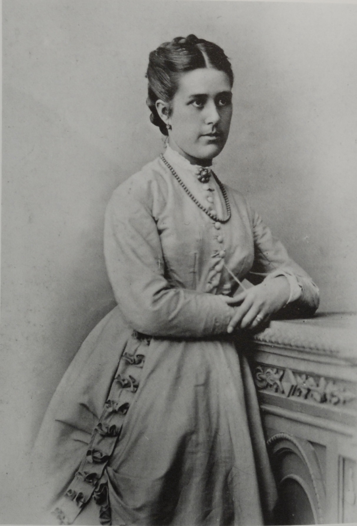 Thomas Manns Mutter Julia Mann (1851 - 1923)